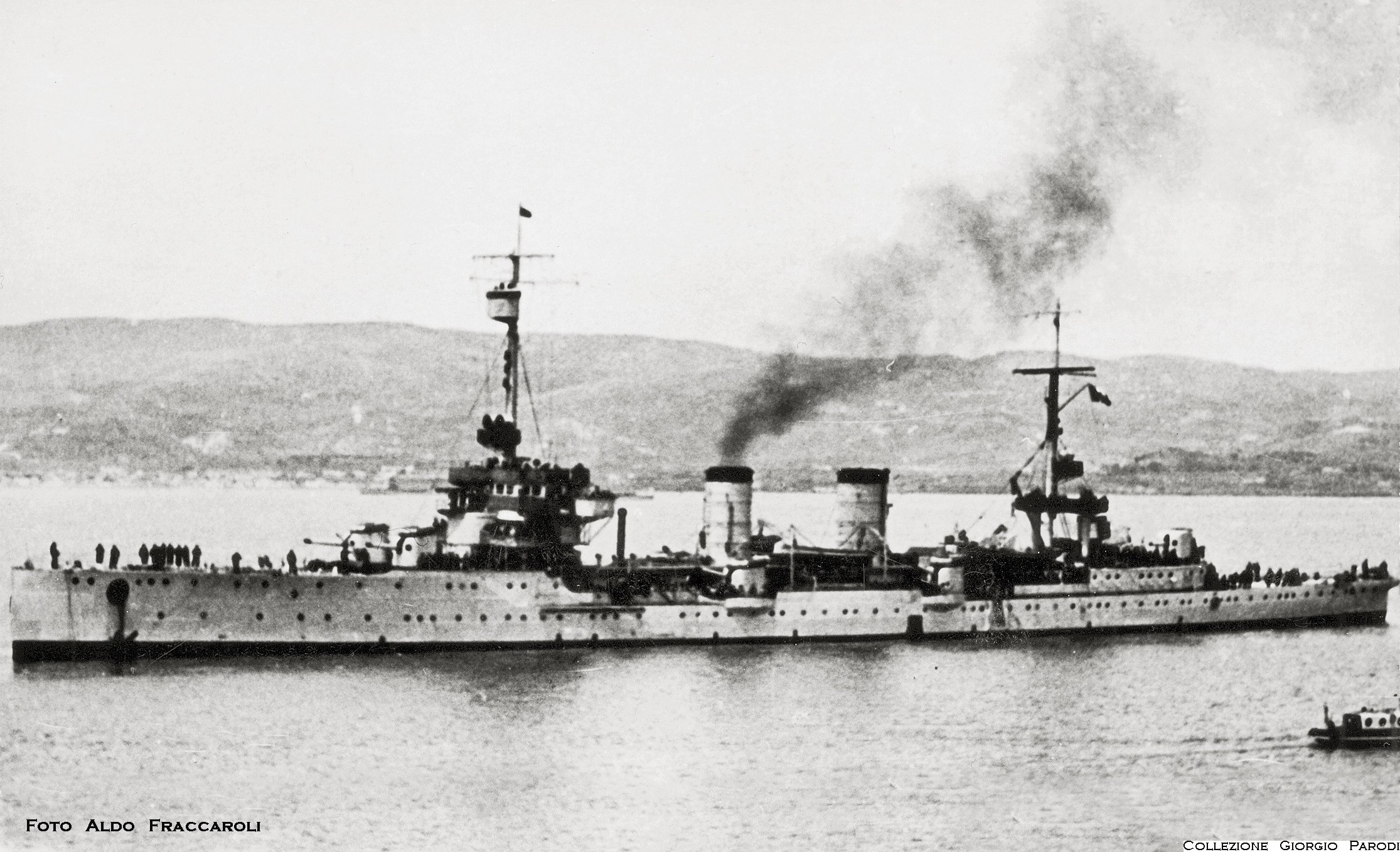 L’incrociatore leggero Bari.